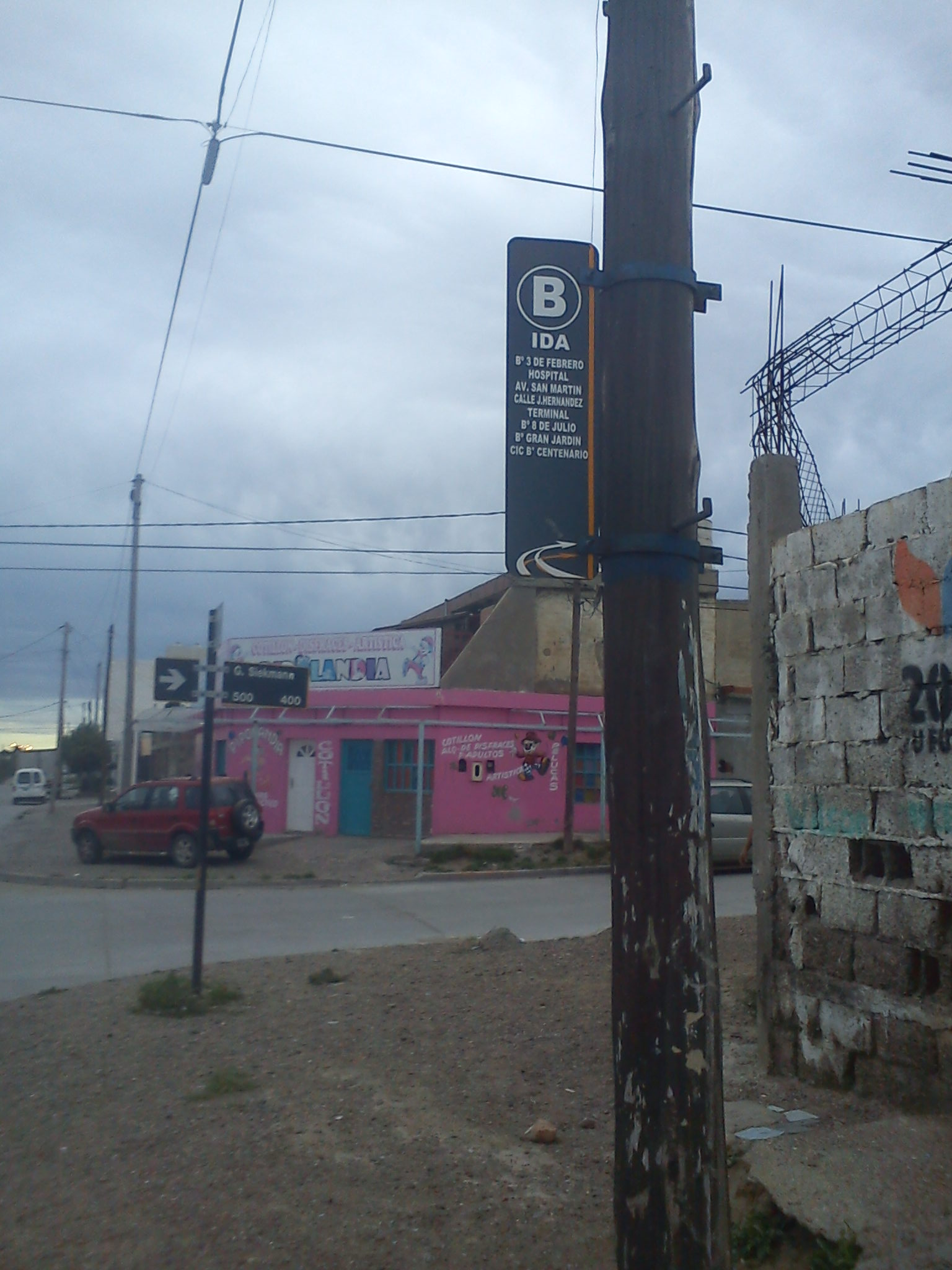 Nomenclatura indicando parada de Autobús